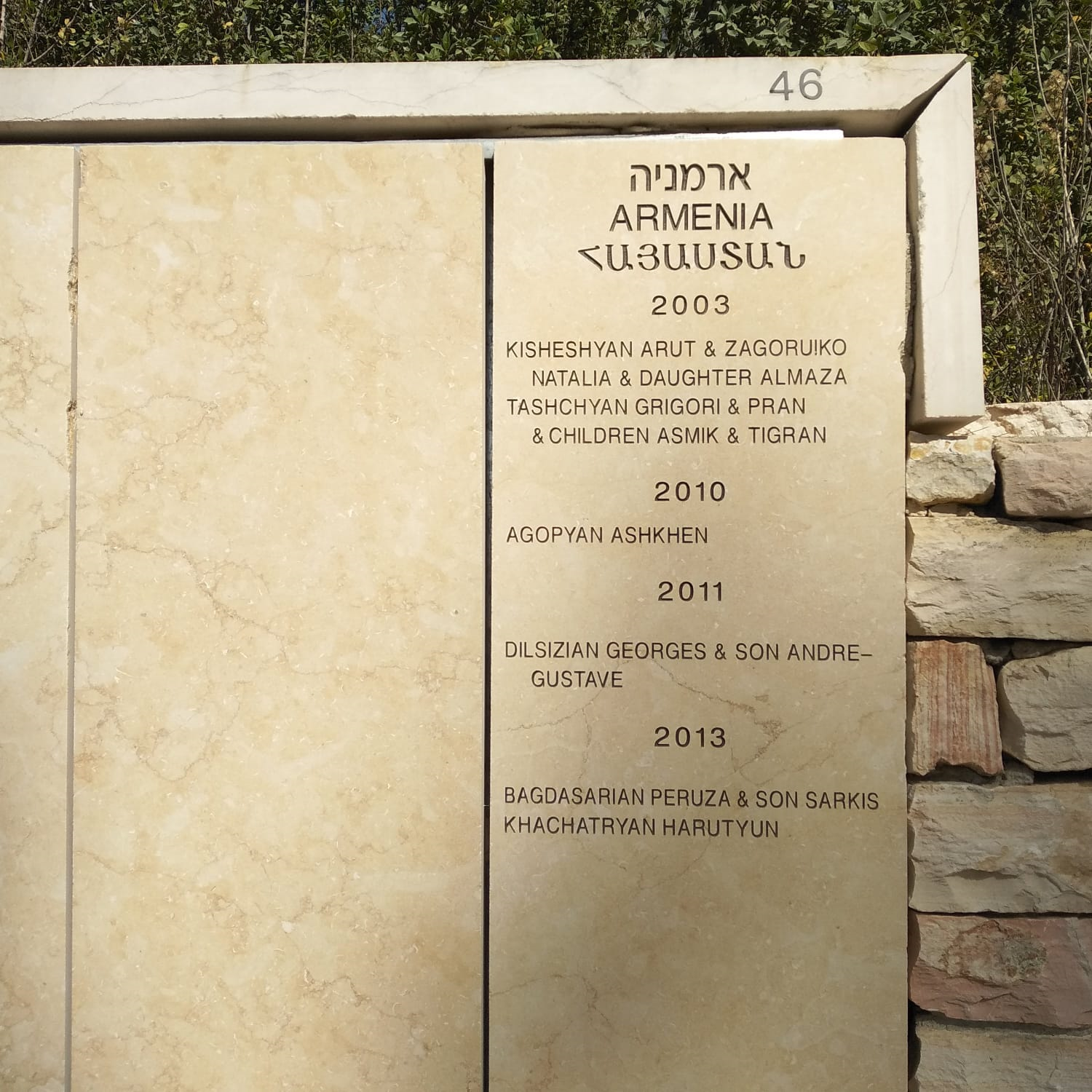 שמה של חסידת אומות העולם אשקהן אגופיאן נחקק על קיר הכבוד בגן חסידי אומות העולם ביד ושם, ירושלים. הוא נמצא במחלקת ארמניה, בהתאם למוצאה.